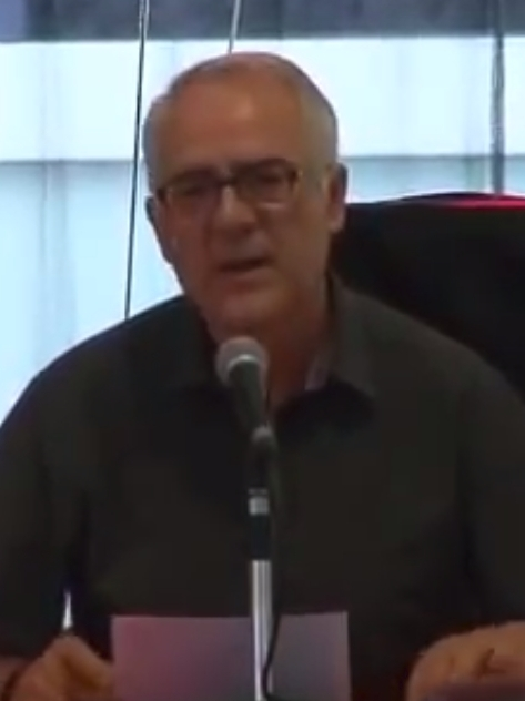 Agustín Moreno, en la fiesta del PCE de 2011